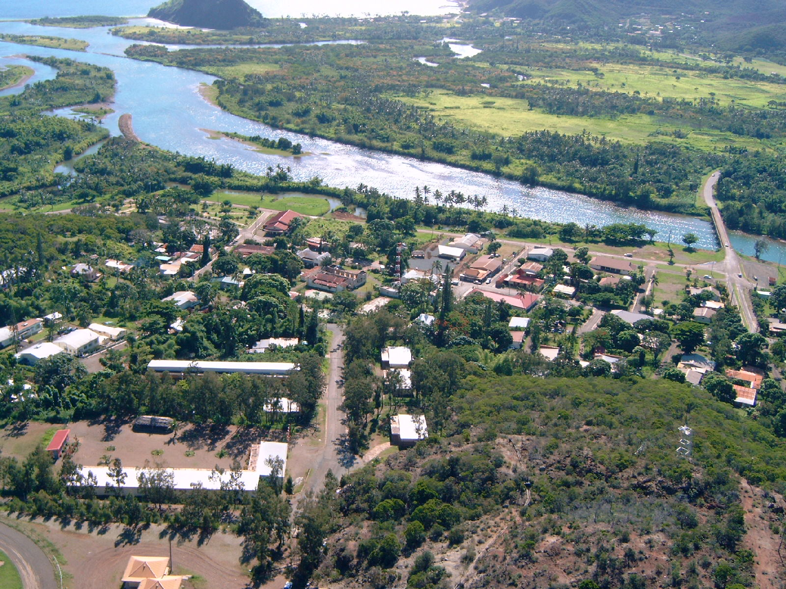 Photographie aérienne du village de Thio